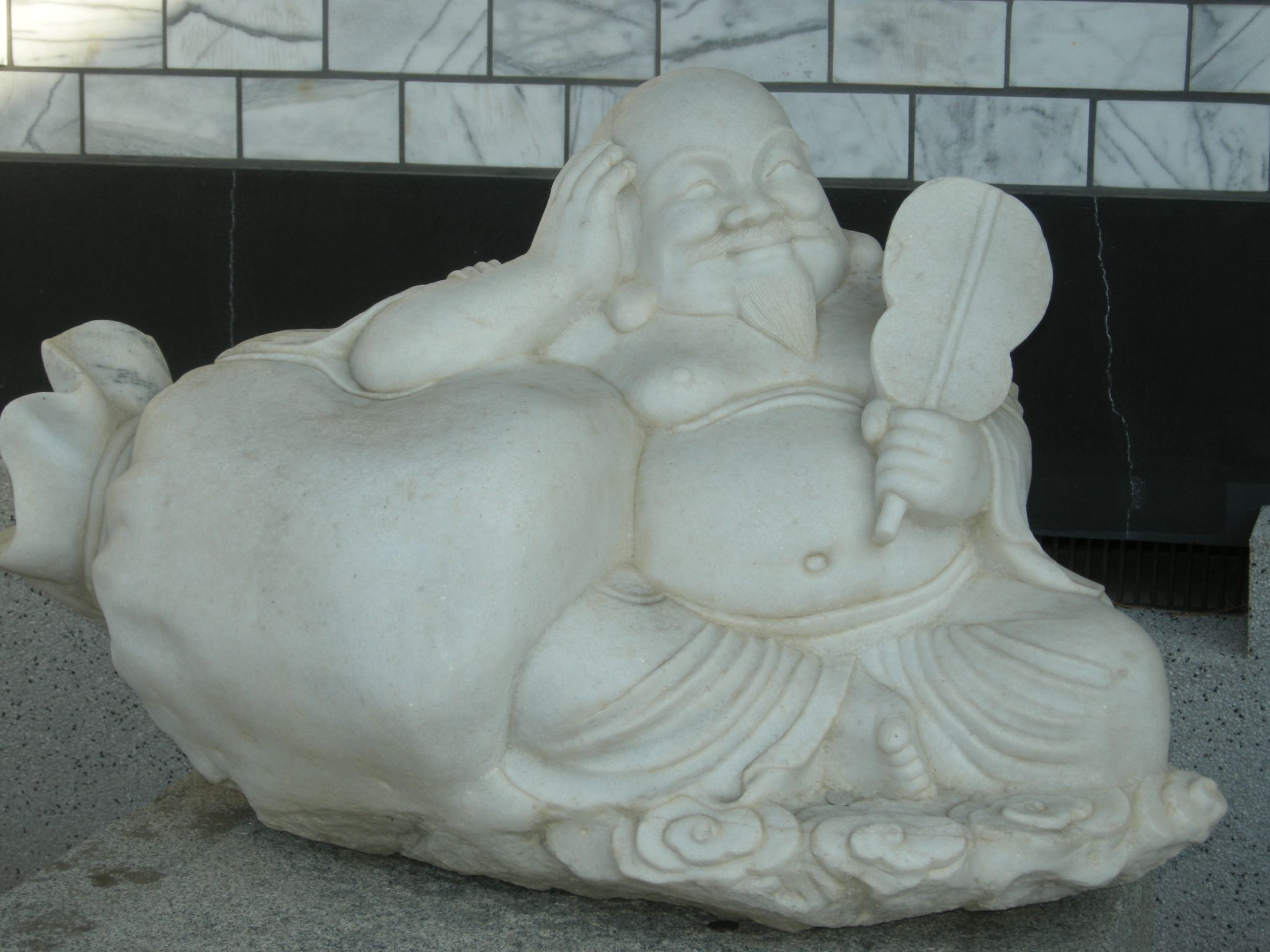 Dio della fortuna grasso e con il viso rotondo